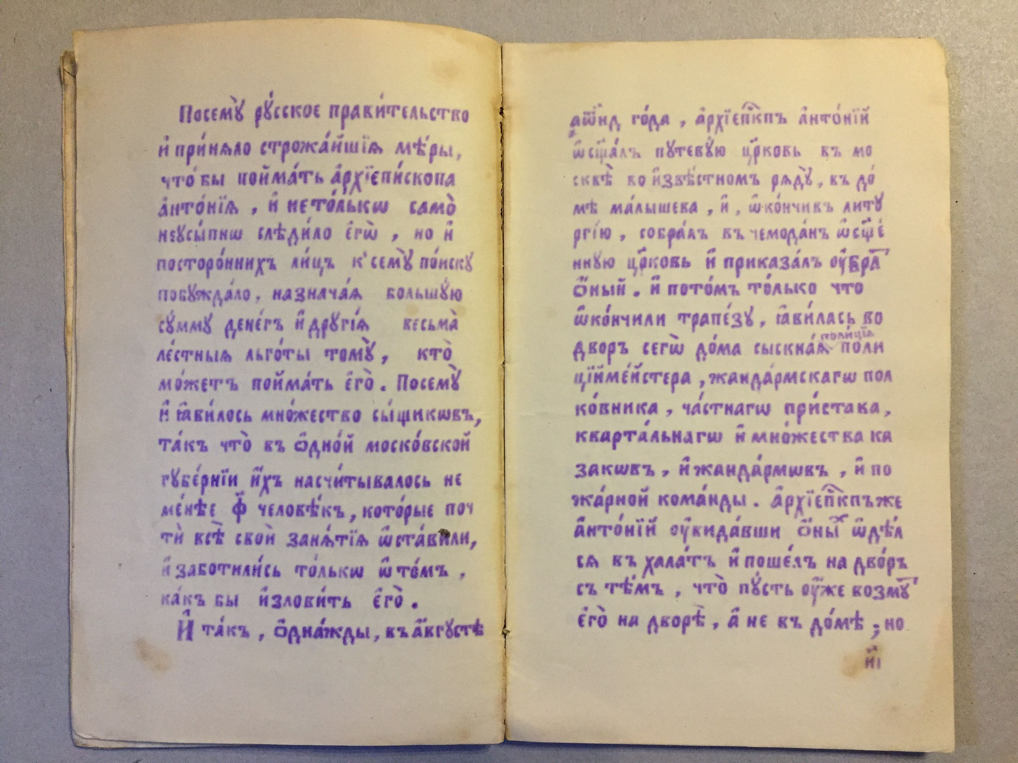 «Жизнь и подвиги Антония, старообрядческаго архиепископа Московскаго и Владимирскаго» Сочинение А.В. Шве­цова Гектографическое издание, 1882-1883 гг.